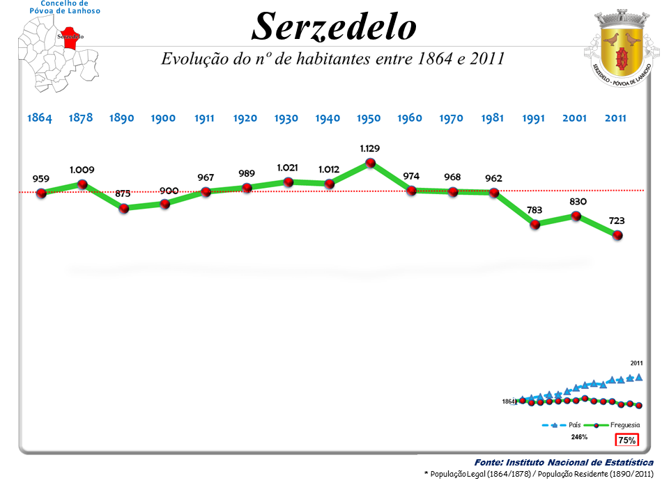 Censos 1864/2011